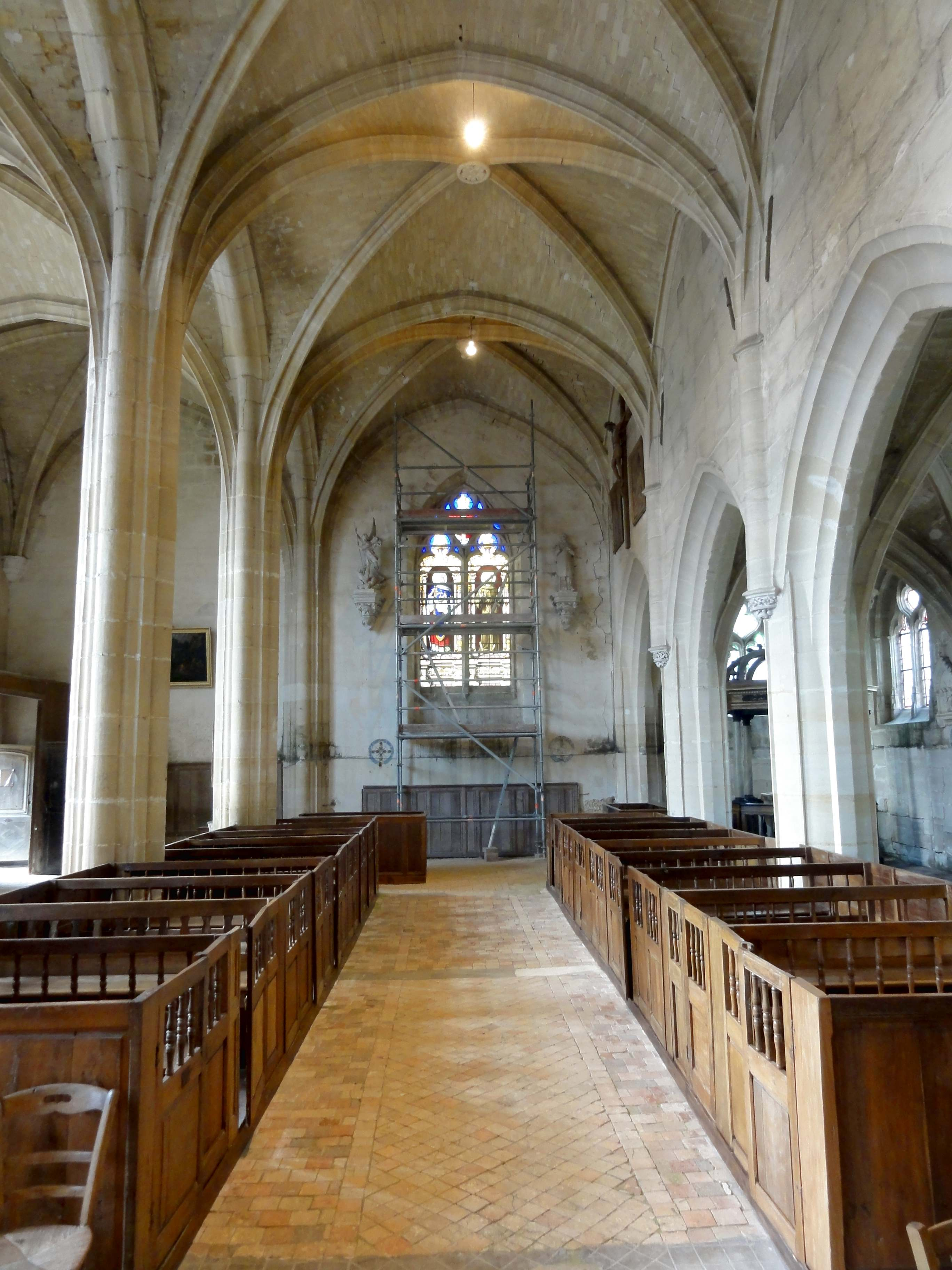 Nef - voir le titre du fichier.